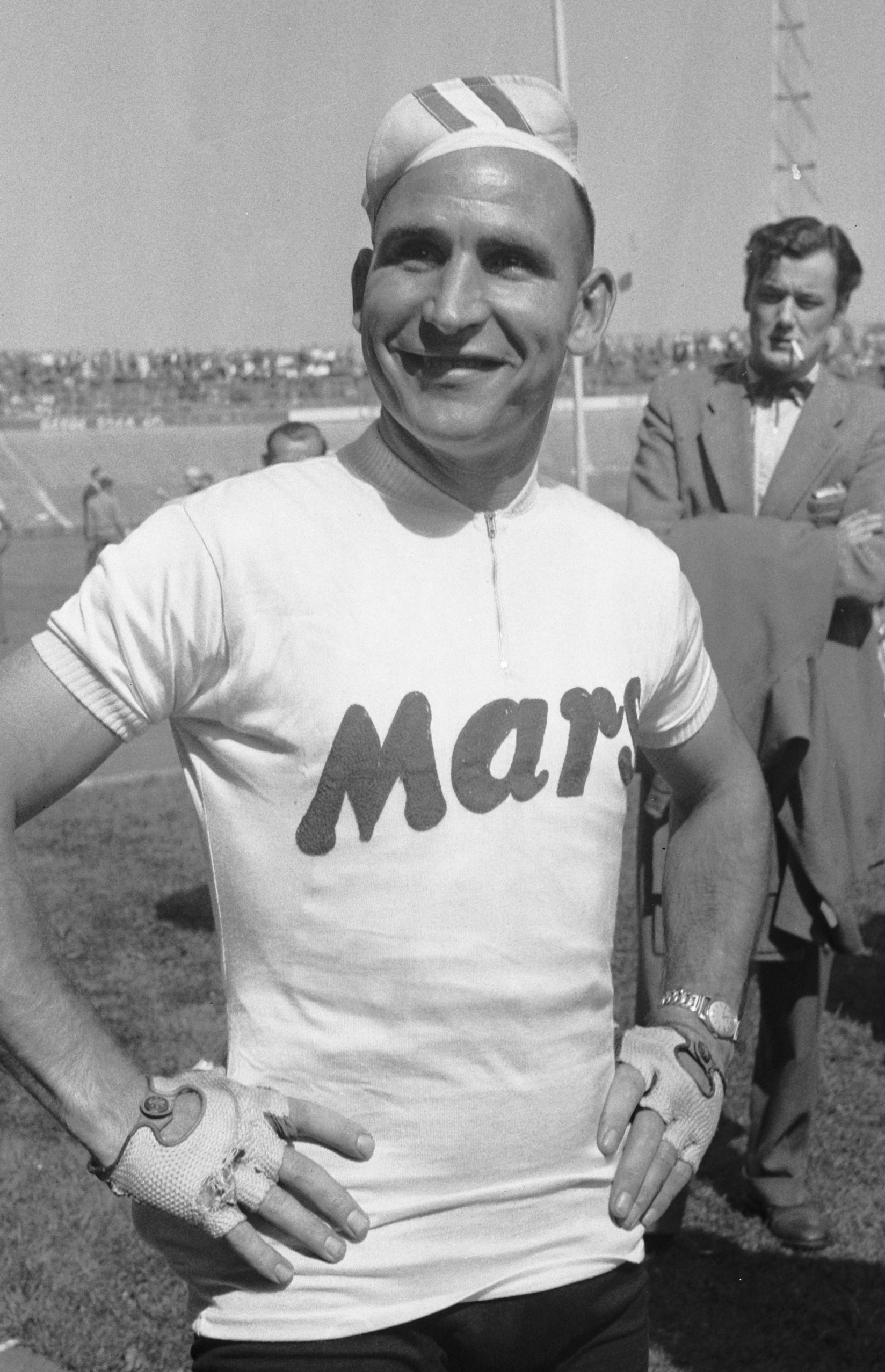 Start Ronde van Nederland Stadion Utrecht . W. van Est , 12A in Nescafe-ploeg